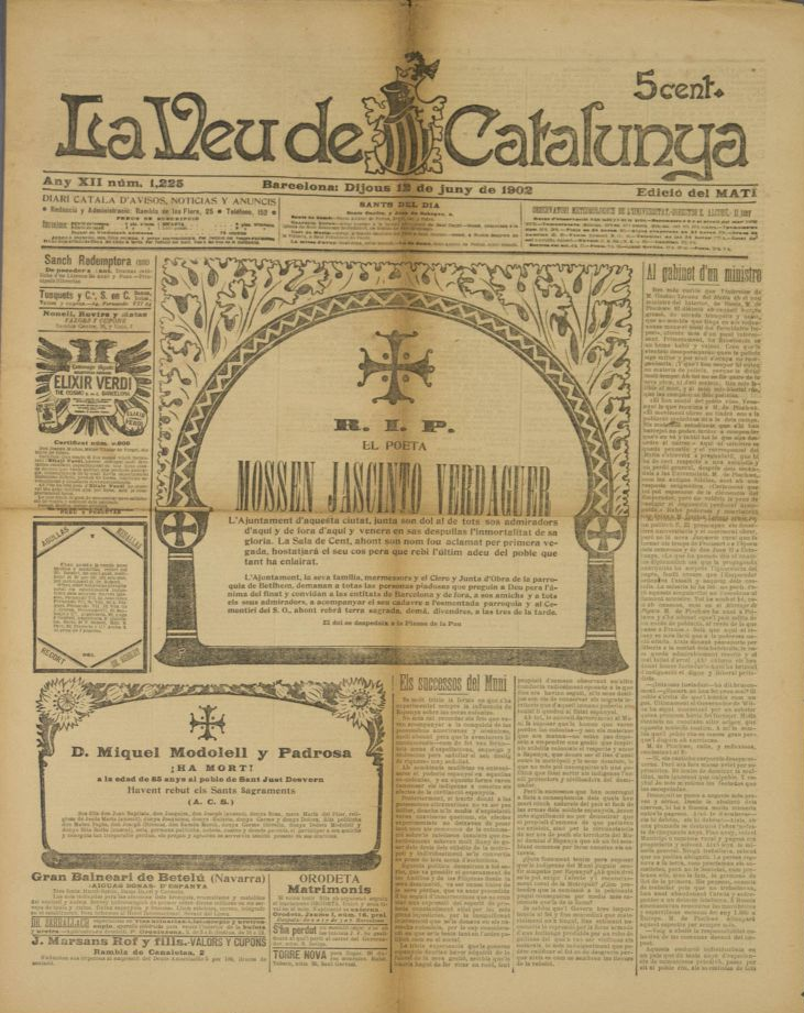 Portada de La Veu de Catalunya 12 juny 1902 amb l'esquela de Verdaguer.